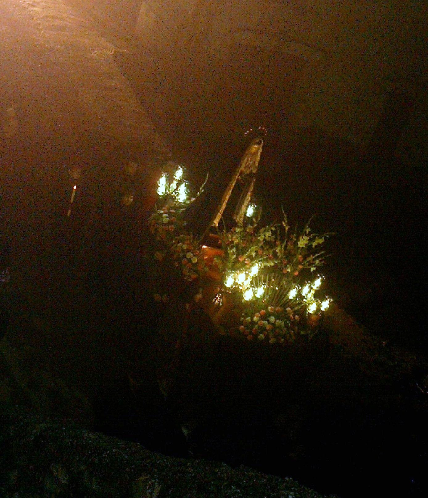 Imagen de La Dolorosa en la Semana Santa de Molinicos (Albacete), procesionando por la Carretera de Albacete.